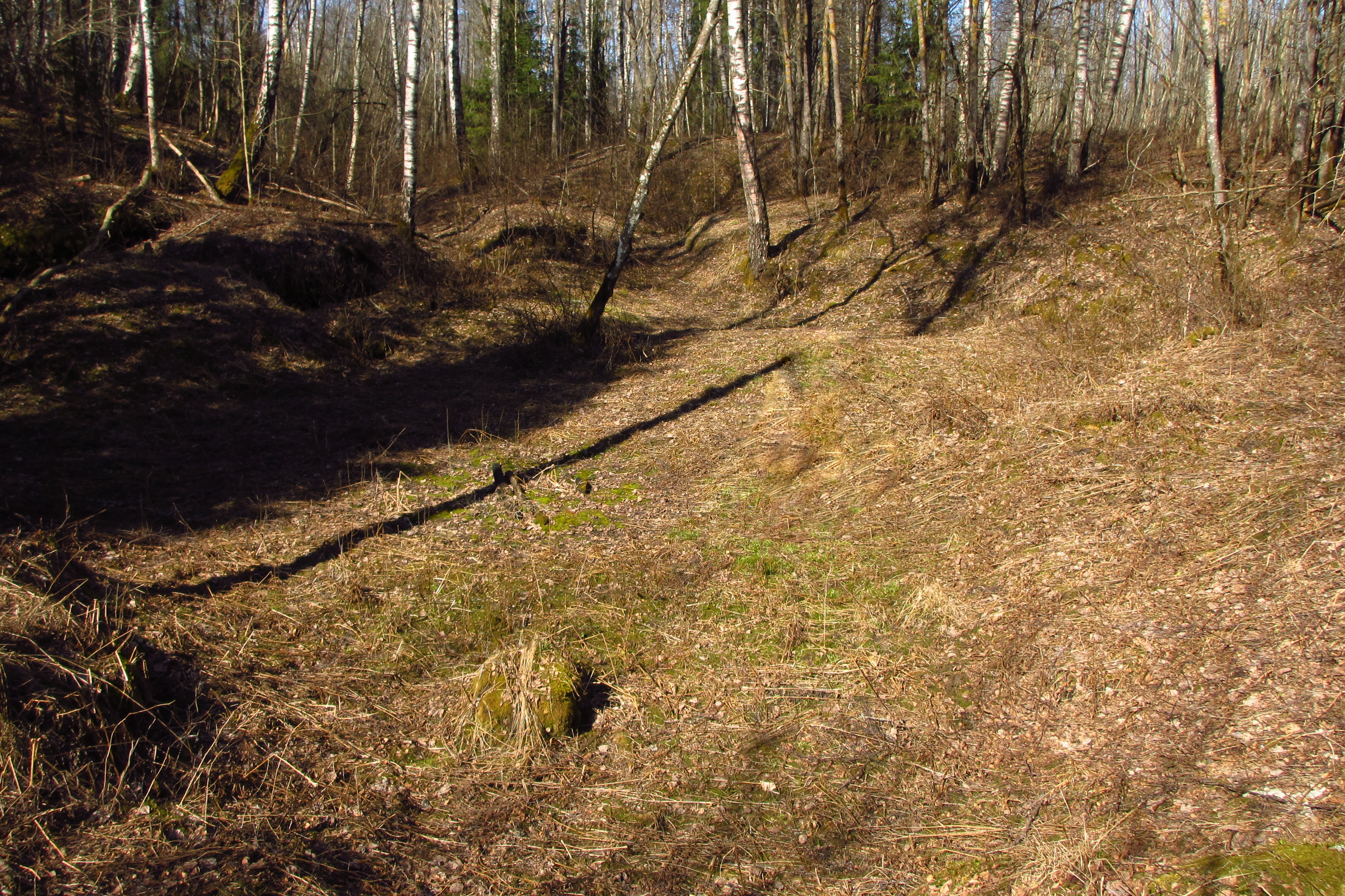 Urge kuristik